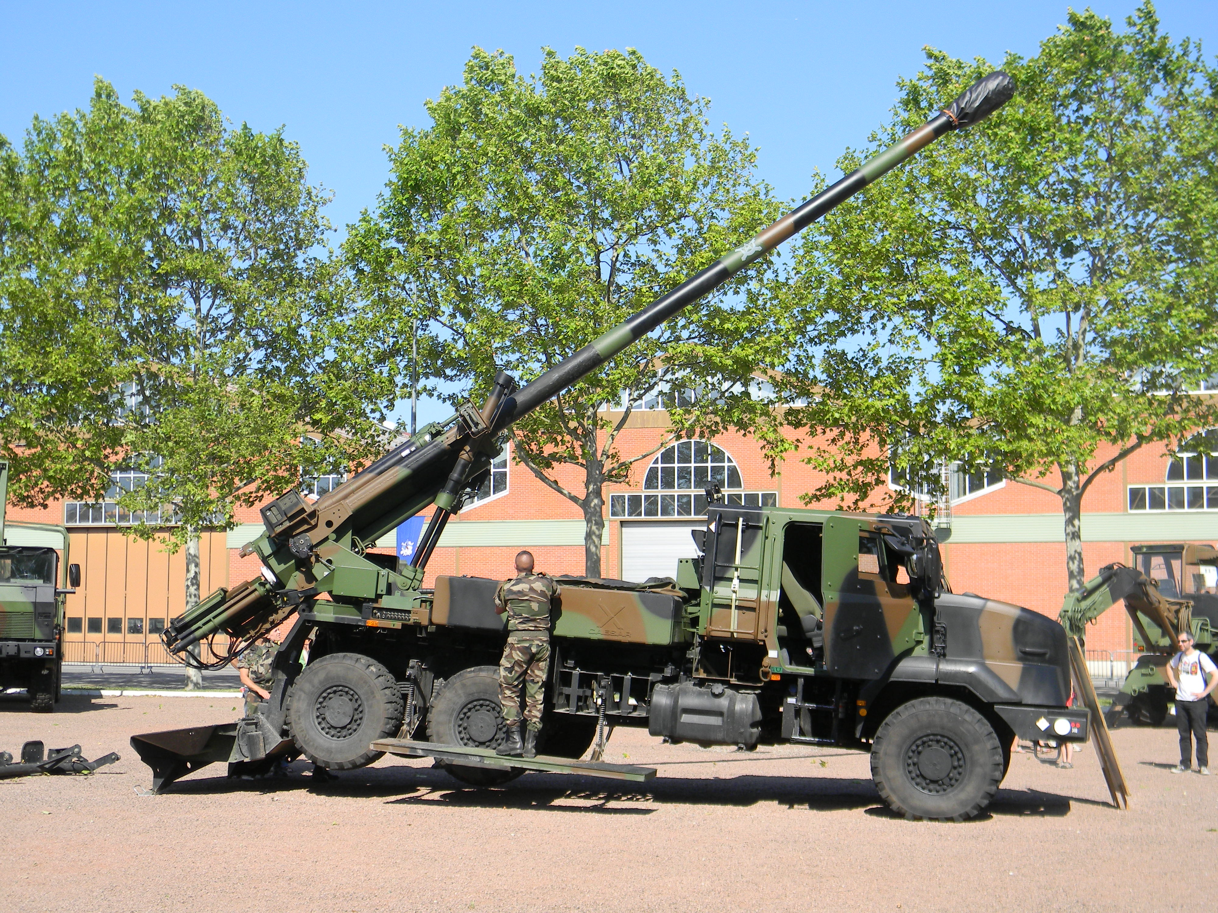 Journées portes ouvertes du quartier général Sabatier à Lyon le 15 et 16 juin 2013.